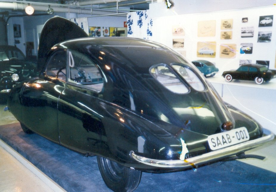 Saab 001 prototype